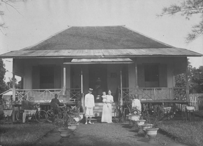 Foto. Een controleurswoning in Pasir aan Borneo's oostkust